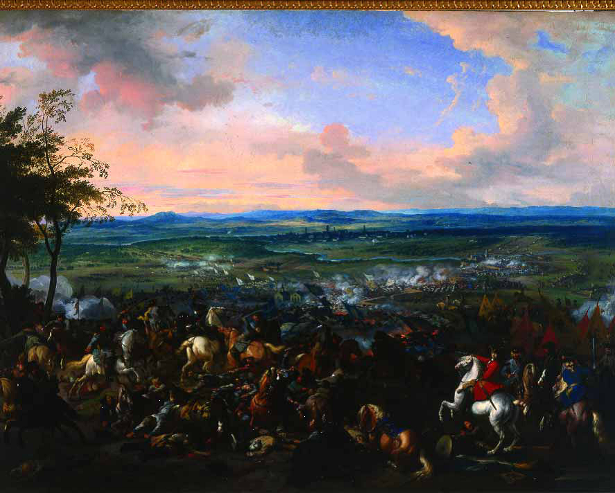 Battaglia di Torino